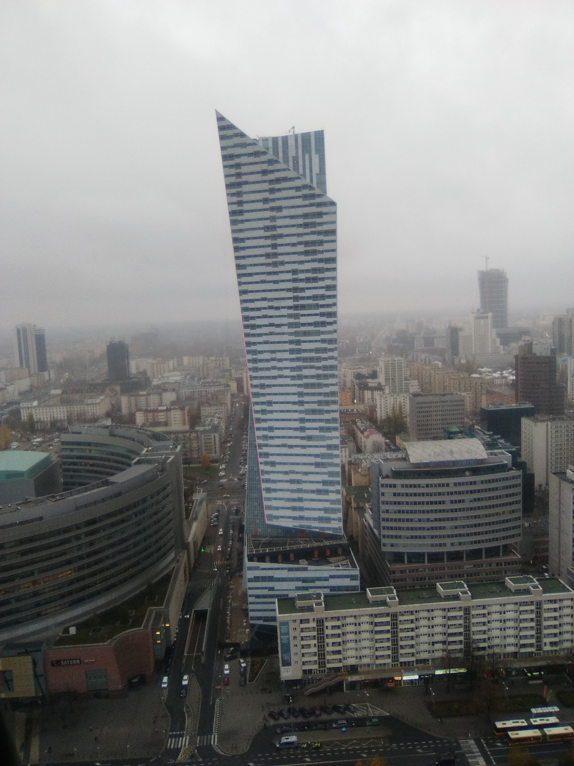 Złota 44 w Warszawie - widok z Pałacu Kultury i Nauki